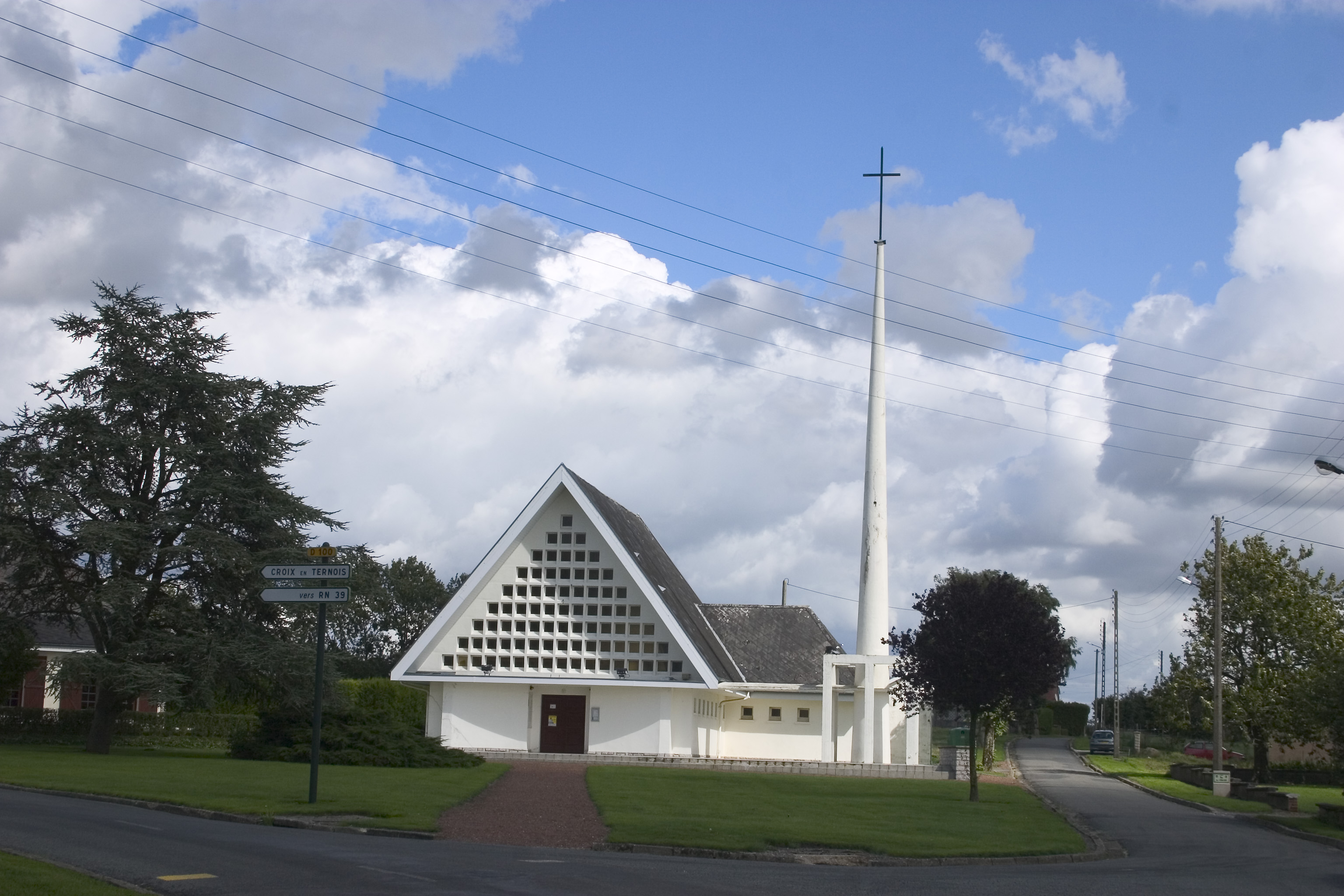 L'église de Siracourt